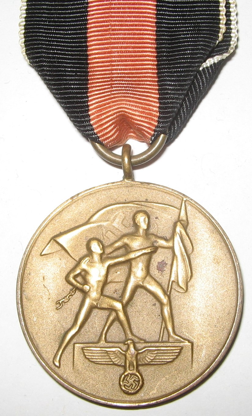 Sudetenland Medal